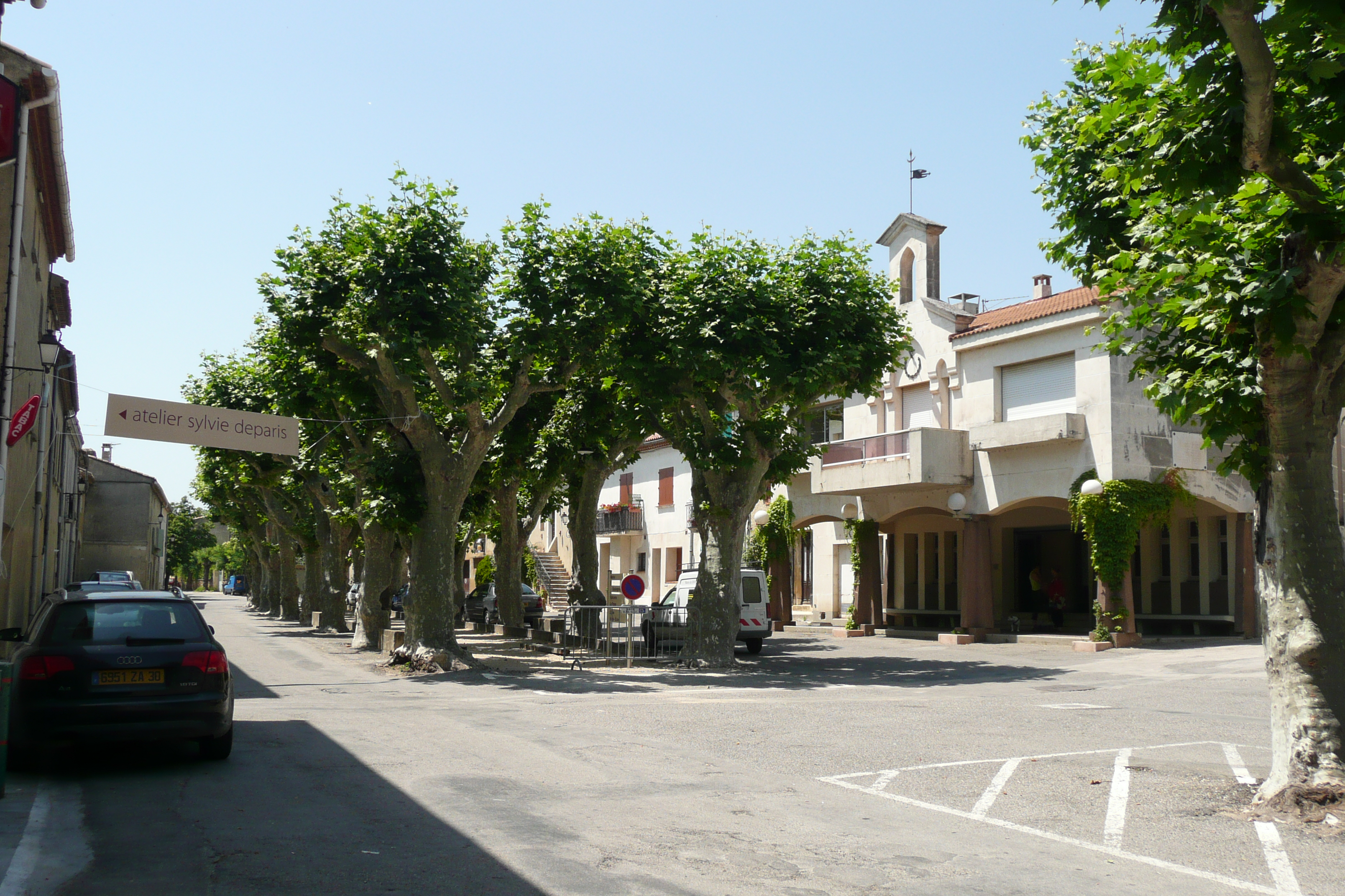 Grande place et la mairie à droite à Domazan.